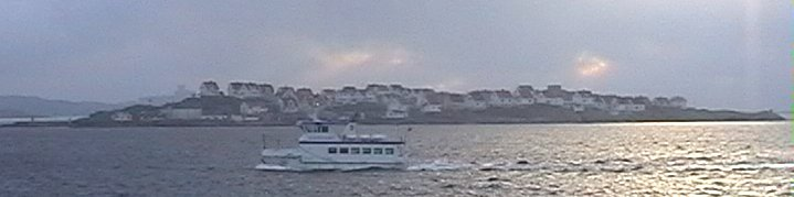 Hakefjord med Åstol bakom GFDL, enligt mailkonversation.